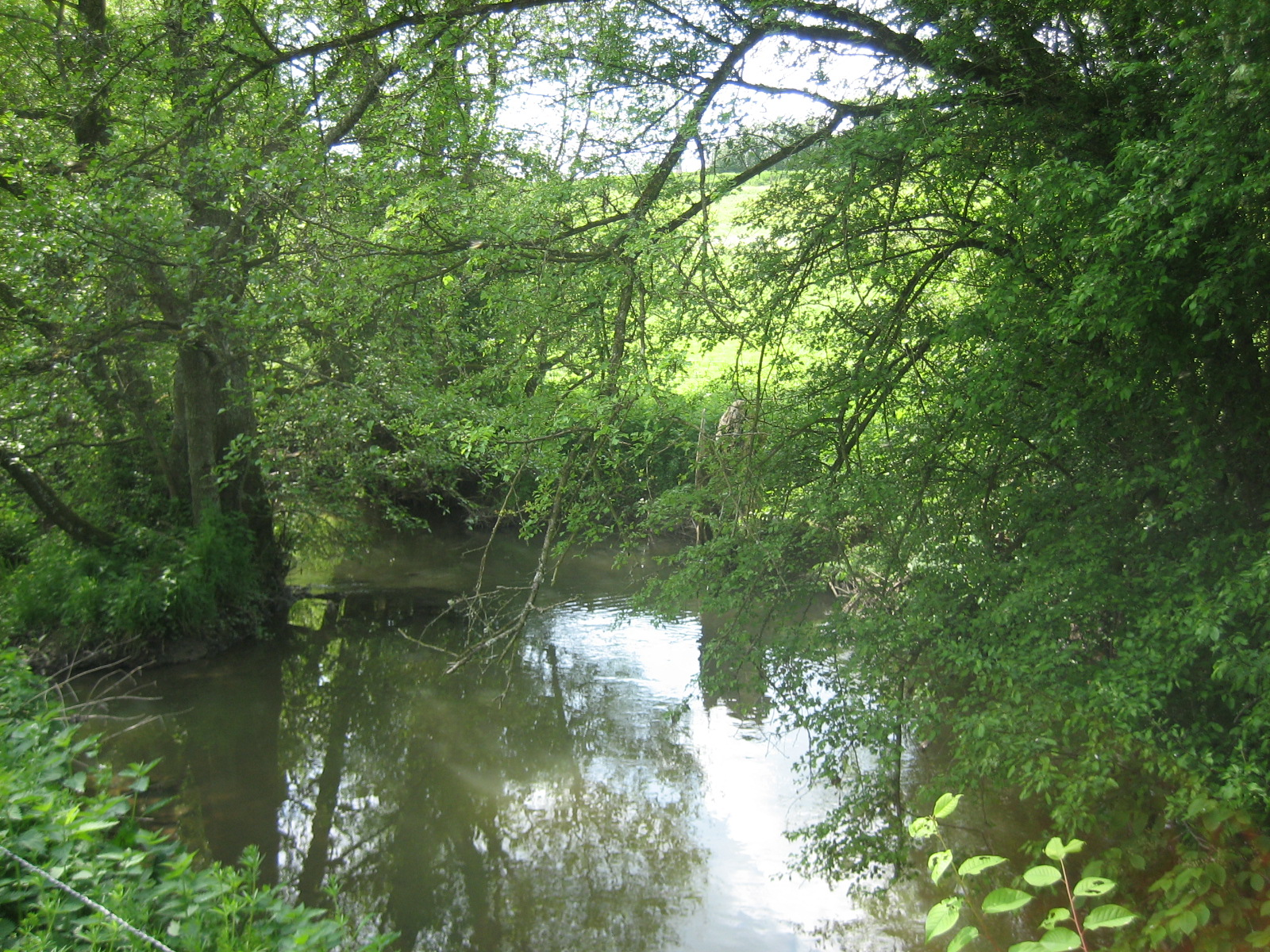 {fr} L'Avière à Oncourt (France)